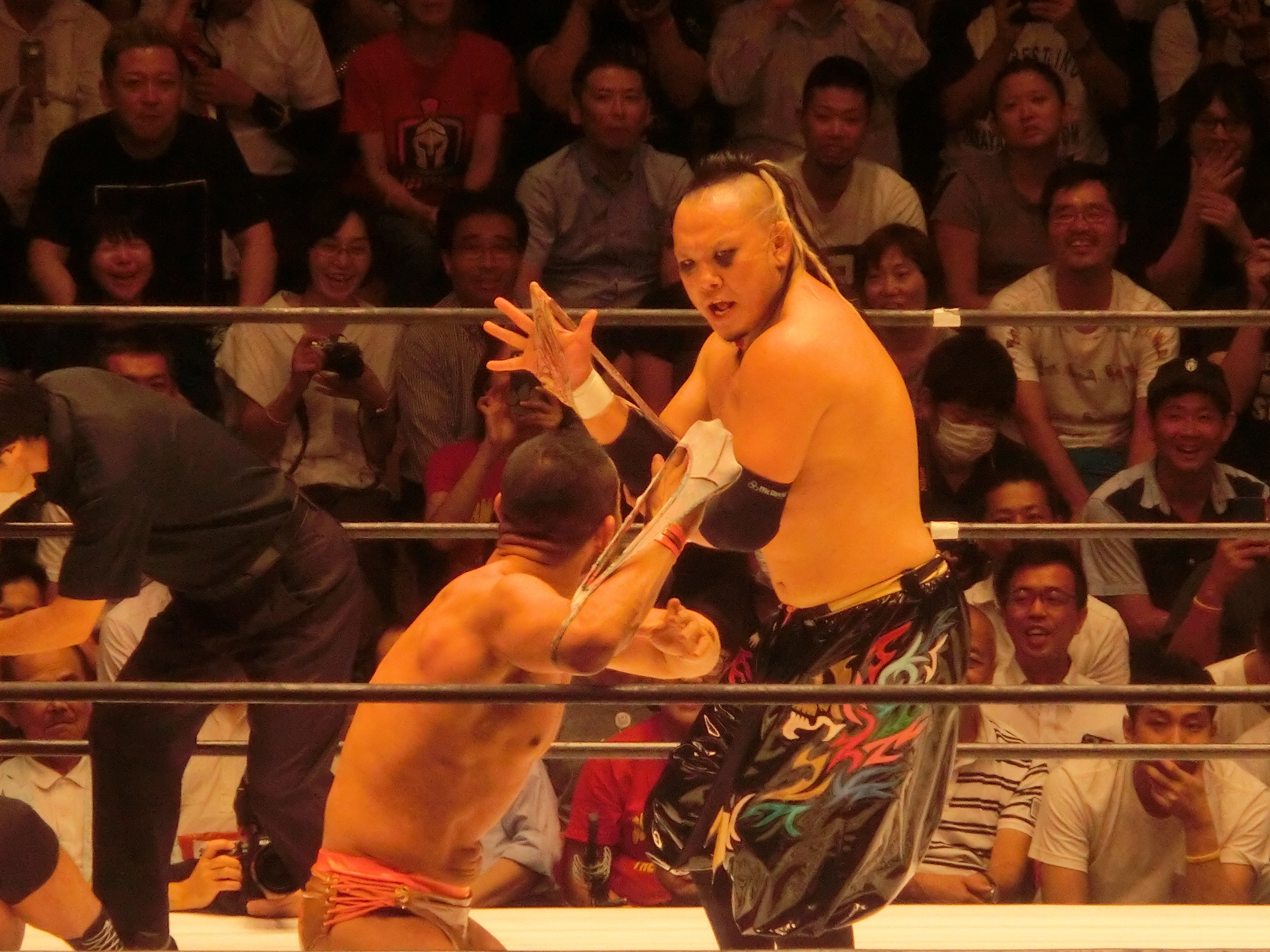 2018年8月31日、後楽園ホール